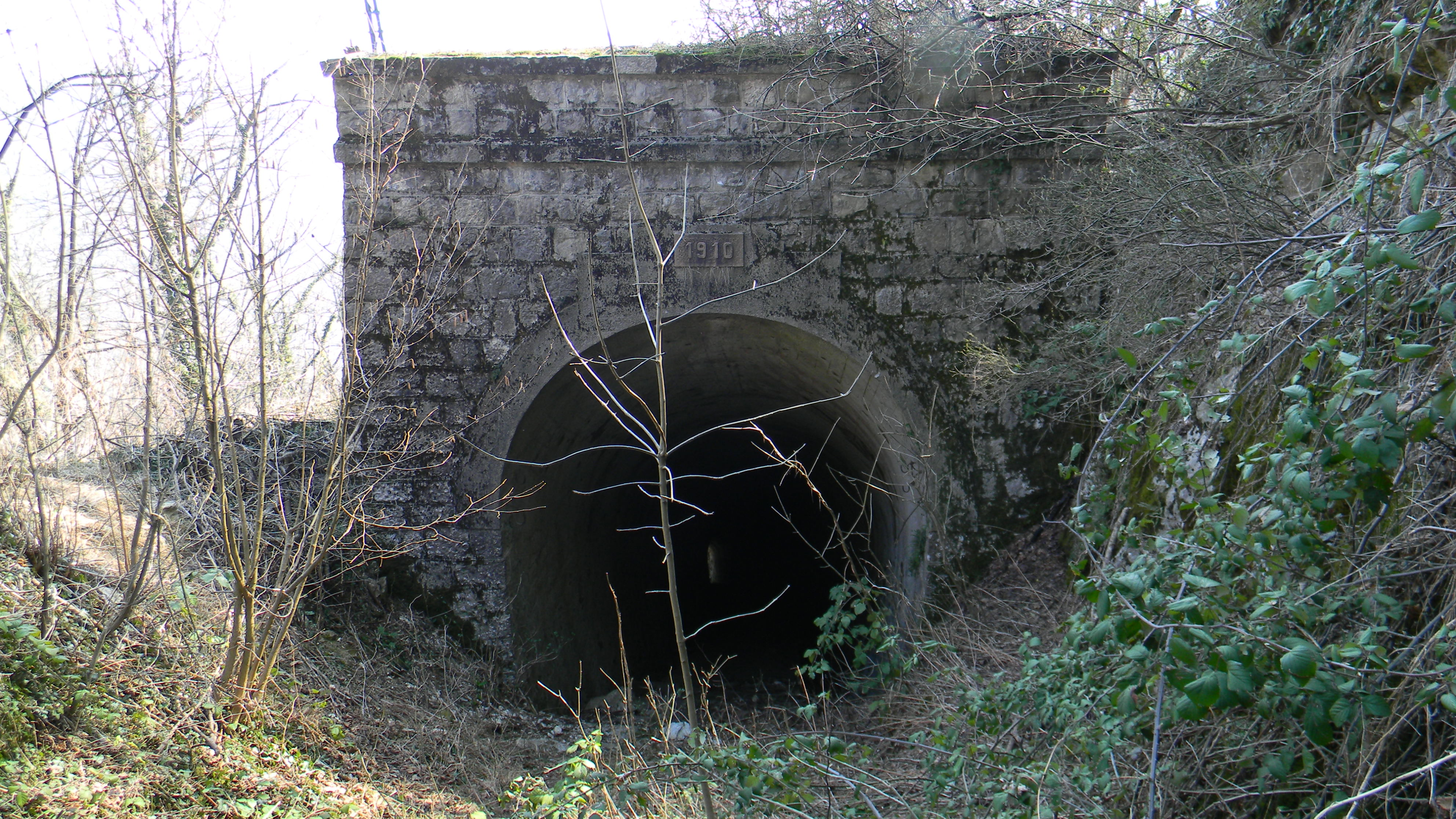 L'ingresso del tunnel lungo la linea della funicolare Vellone-Campo dei Fiori (Varese - Italia)